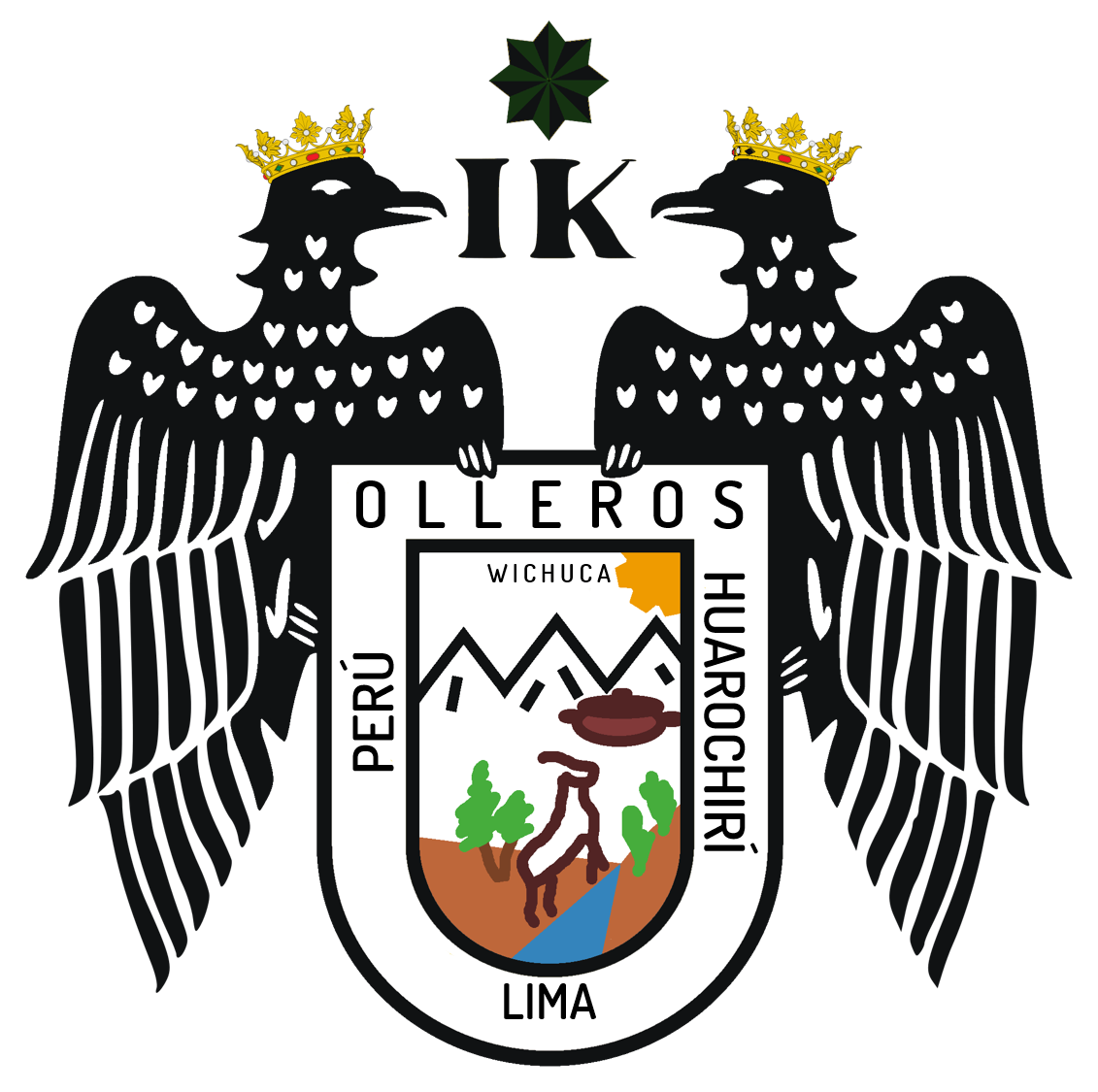 Santo Domingo de los Olleros, Huarochirí, Lima